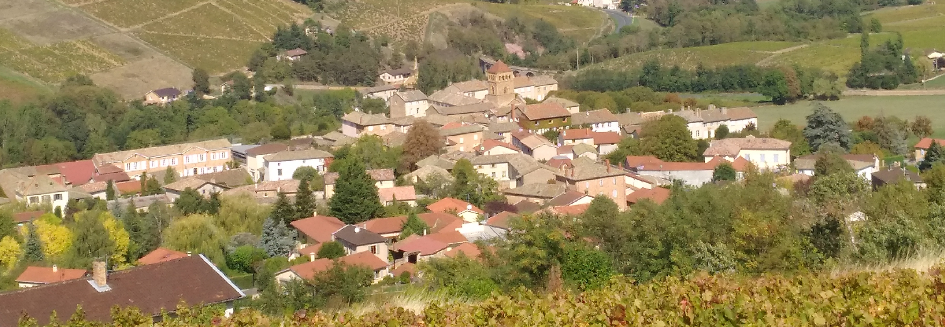 Vue du village de Salles, de la commune de Salles-Arbuissonnas-en-Beaujolais en 2017.